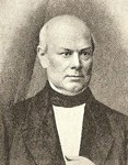 Finnish statesman Fabian Langenskiöld (1810—1863).